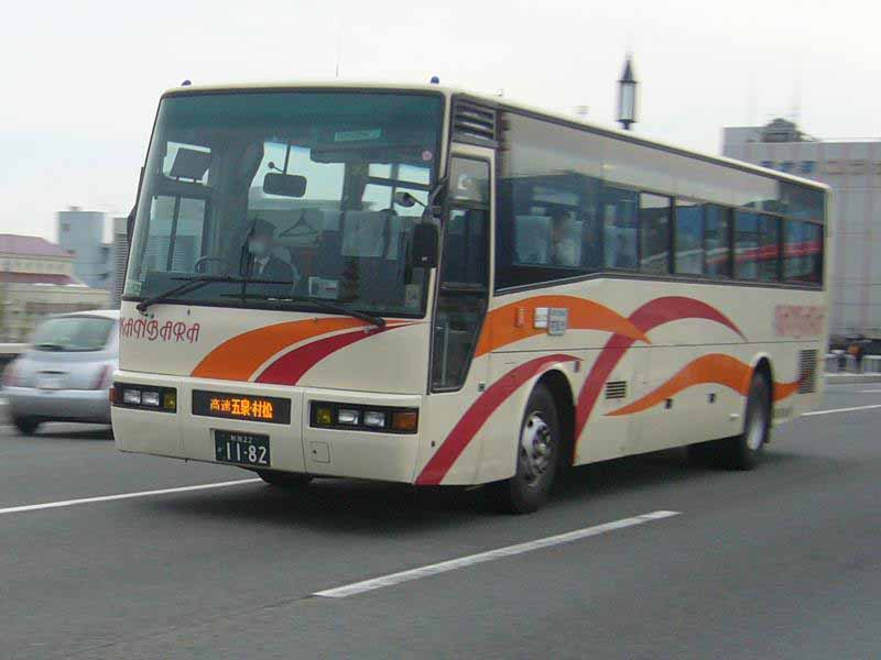 登録番号：新潟22か11-82 蒲原鉄道(Kanbara Tetsudo)所属 村松 - 新潟線用